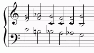 Passus Duriusculus